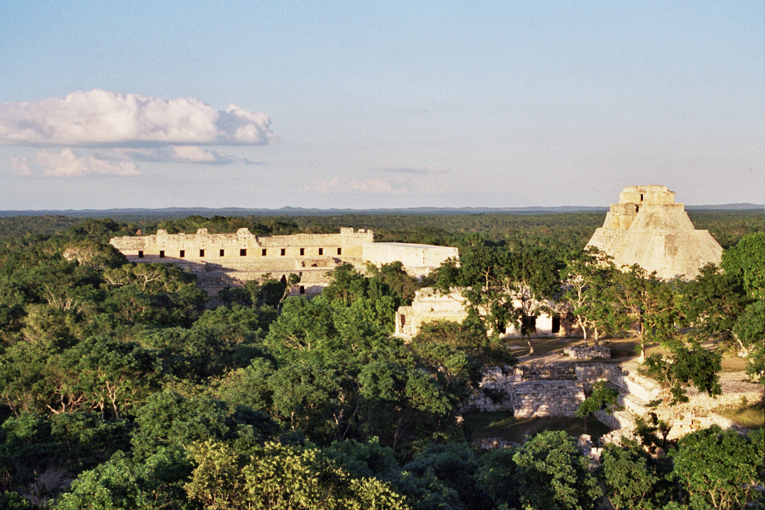 Del conjunto, desde una de las pirámides. No es selva, es monte bajo (?)Vista general